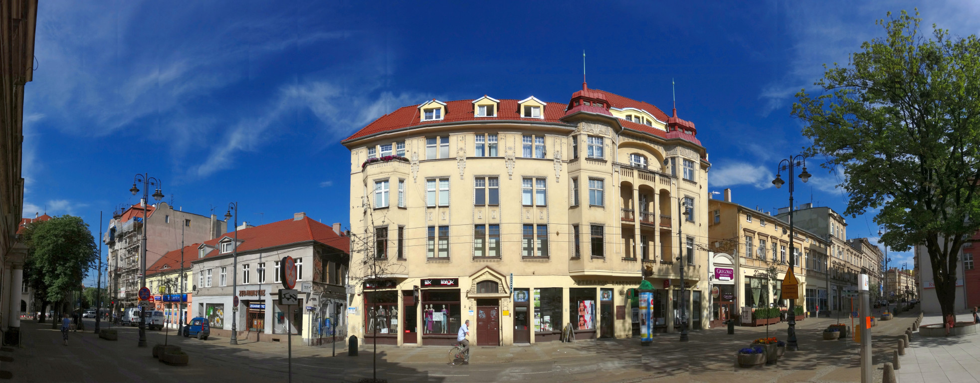 Ulica Gdańska w Bydgoszczy